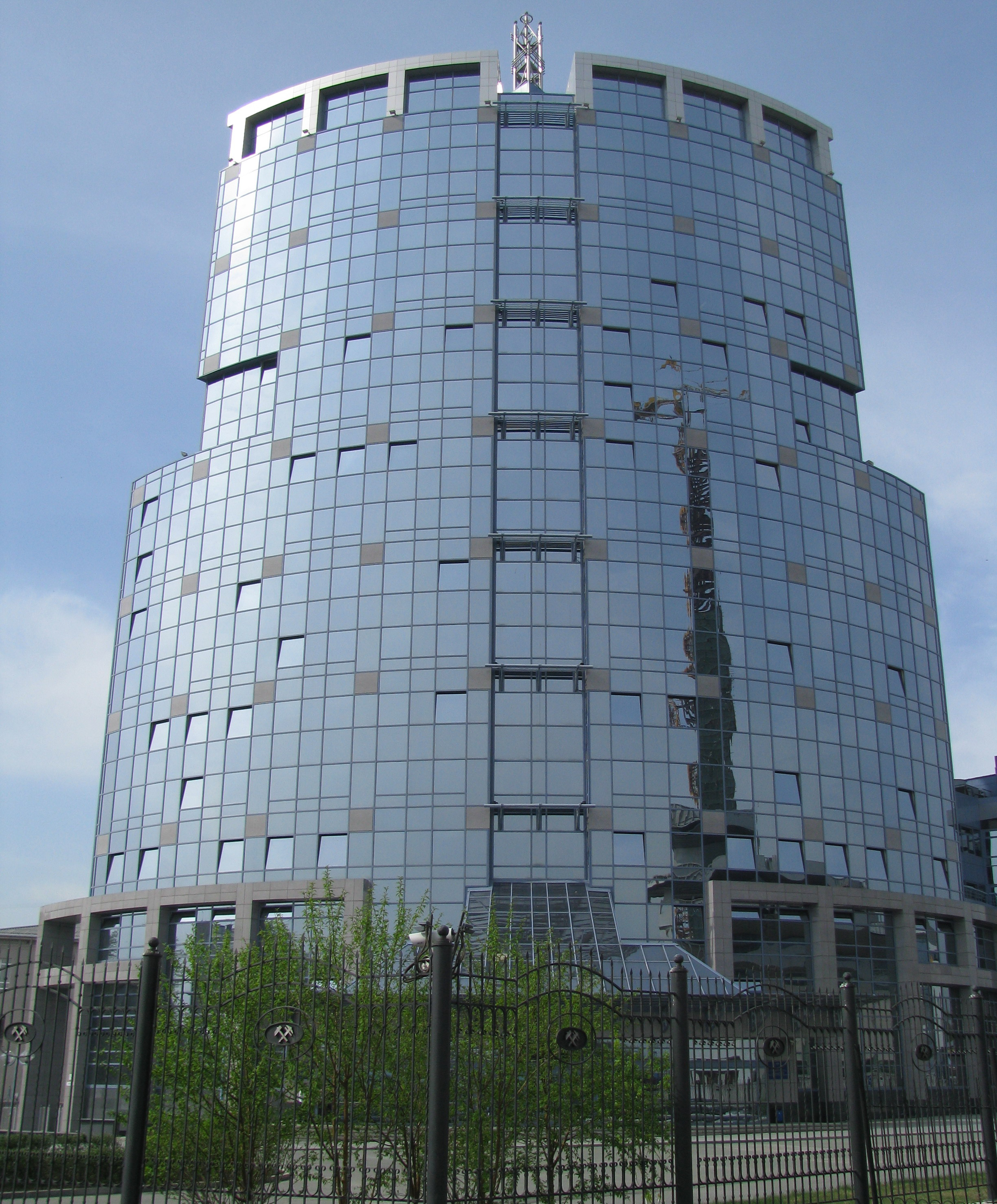 Диспетчерский центр управления перевозками Свердловской железнодорожной магистрали (Екатеринбург).